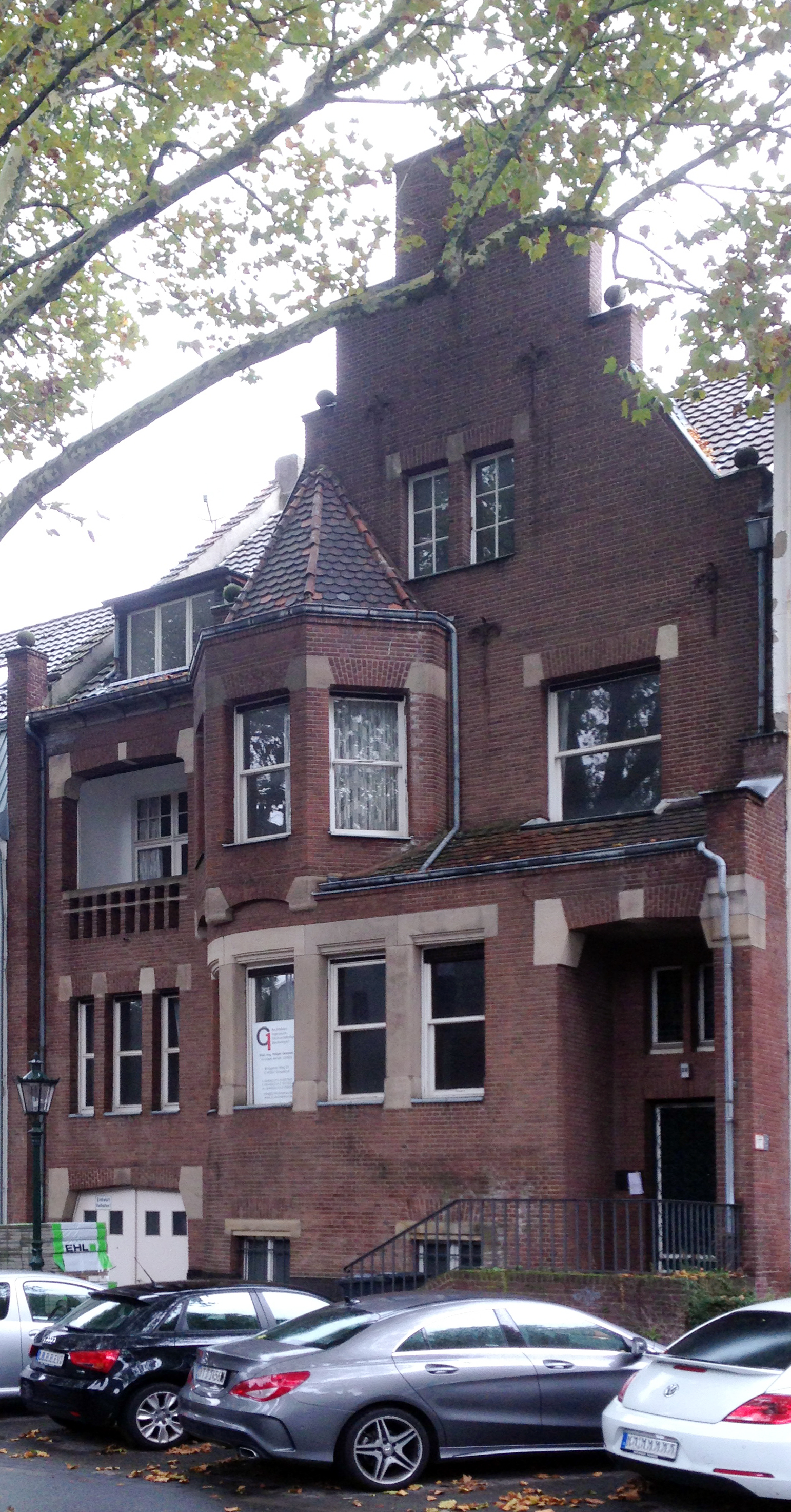 Haus Wildenbruchstraße 28, Düsseldorf-Oberkassel, Architekten Verheyen und Stobbe, gebaut 1905–906, für den Bildhauer Johannes Knubel